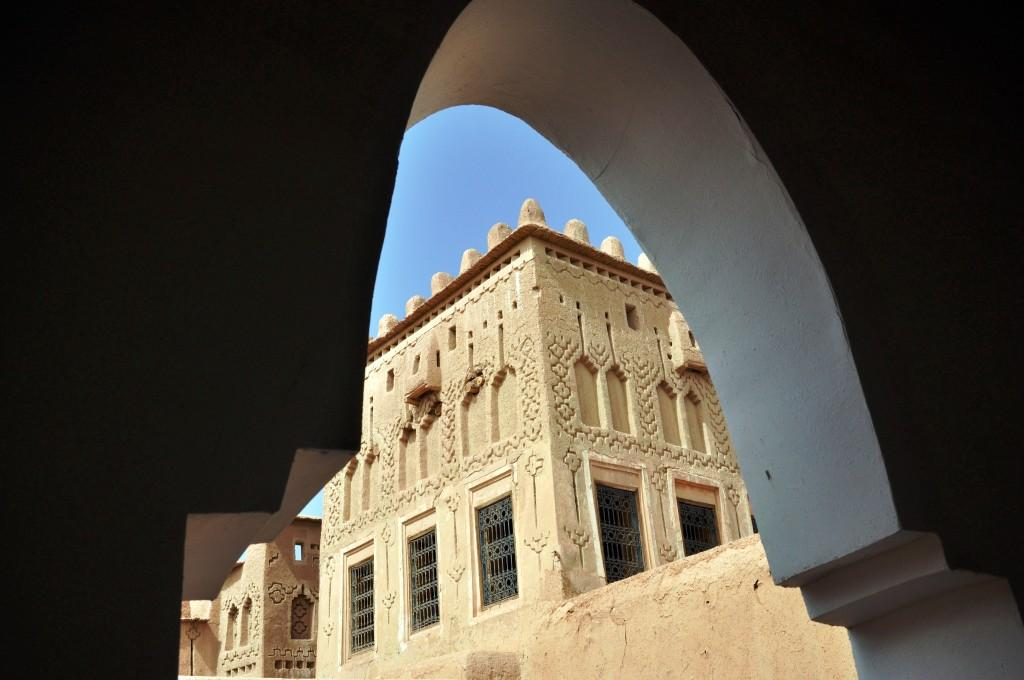 La kasbah de Ouarzazate